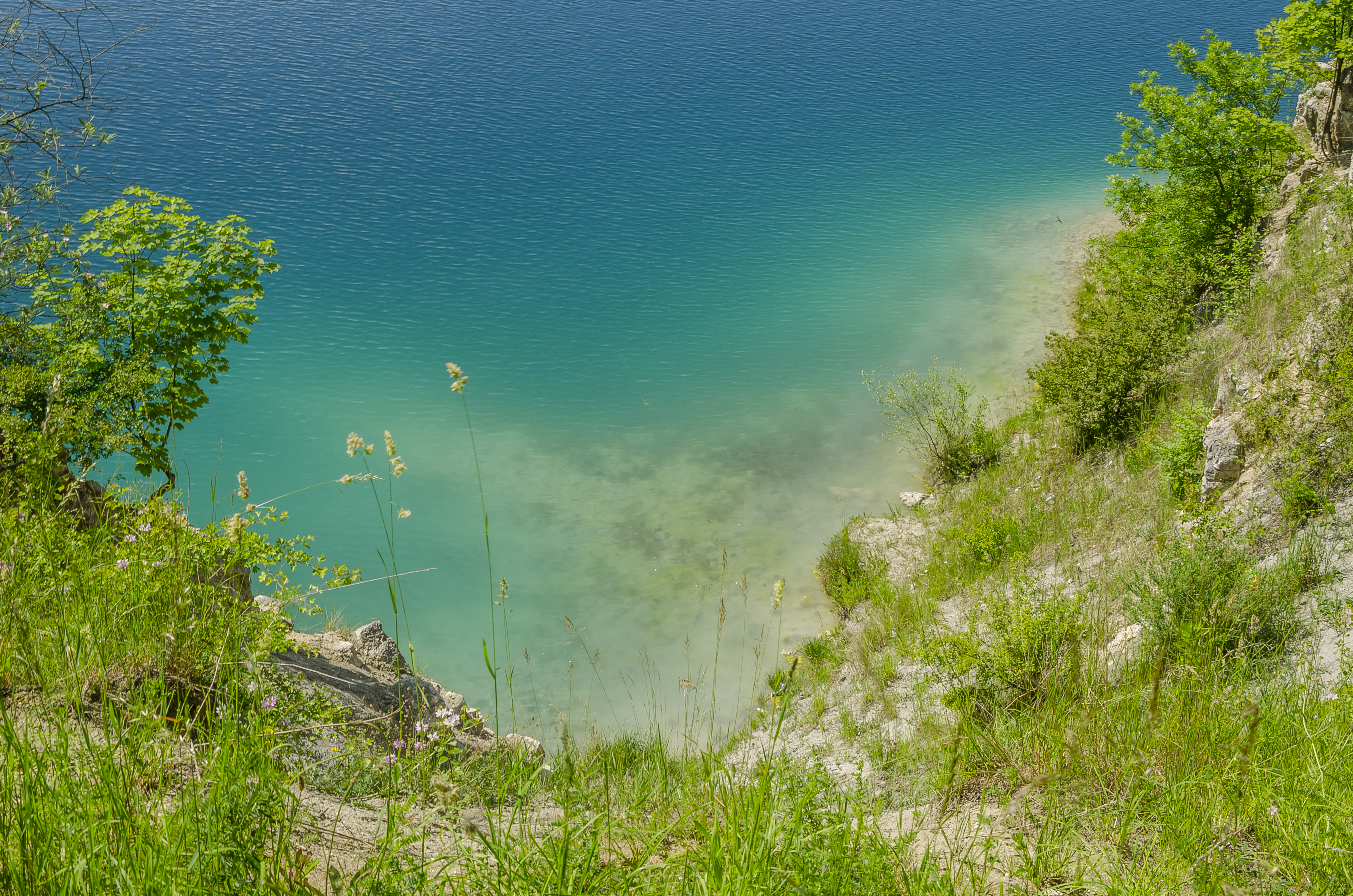 Zakrzówek, Kraków, Poland